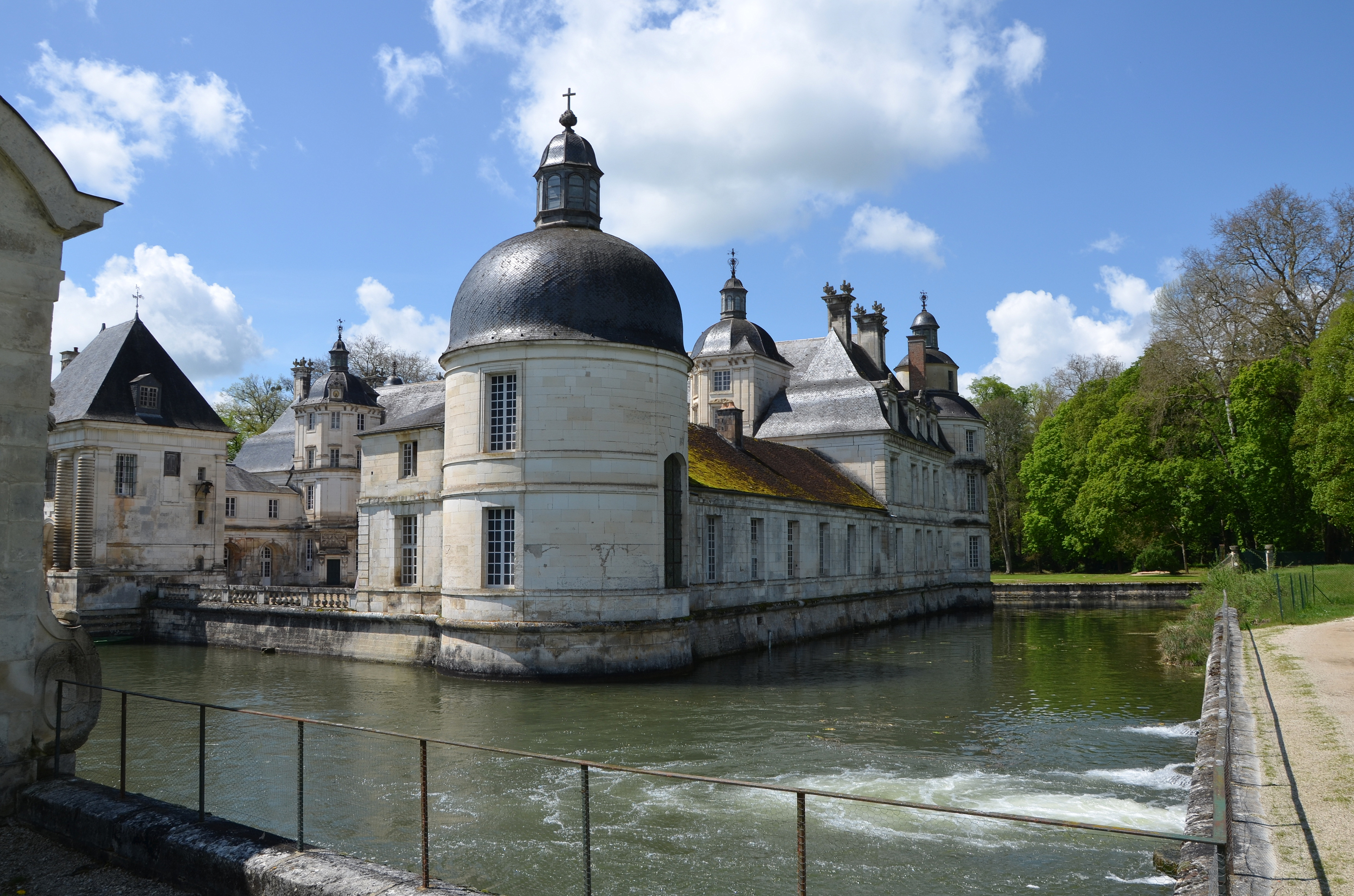 Château de Tanlay, Yonne, France